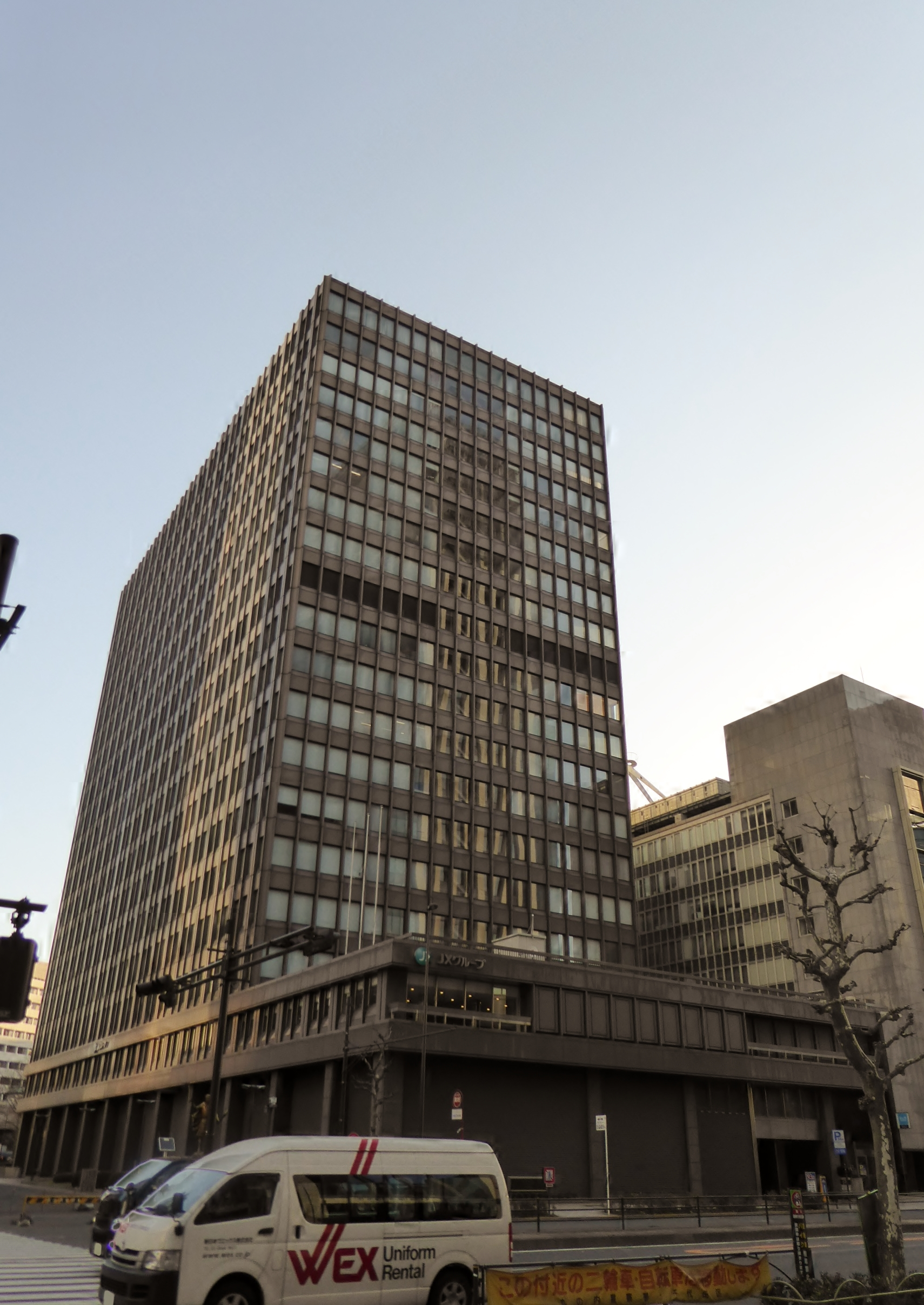 JXビルを撮影。